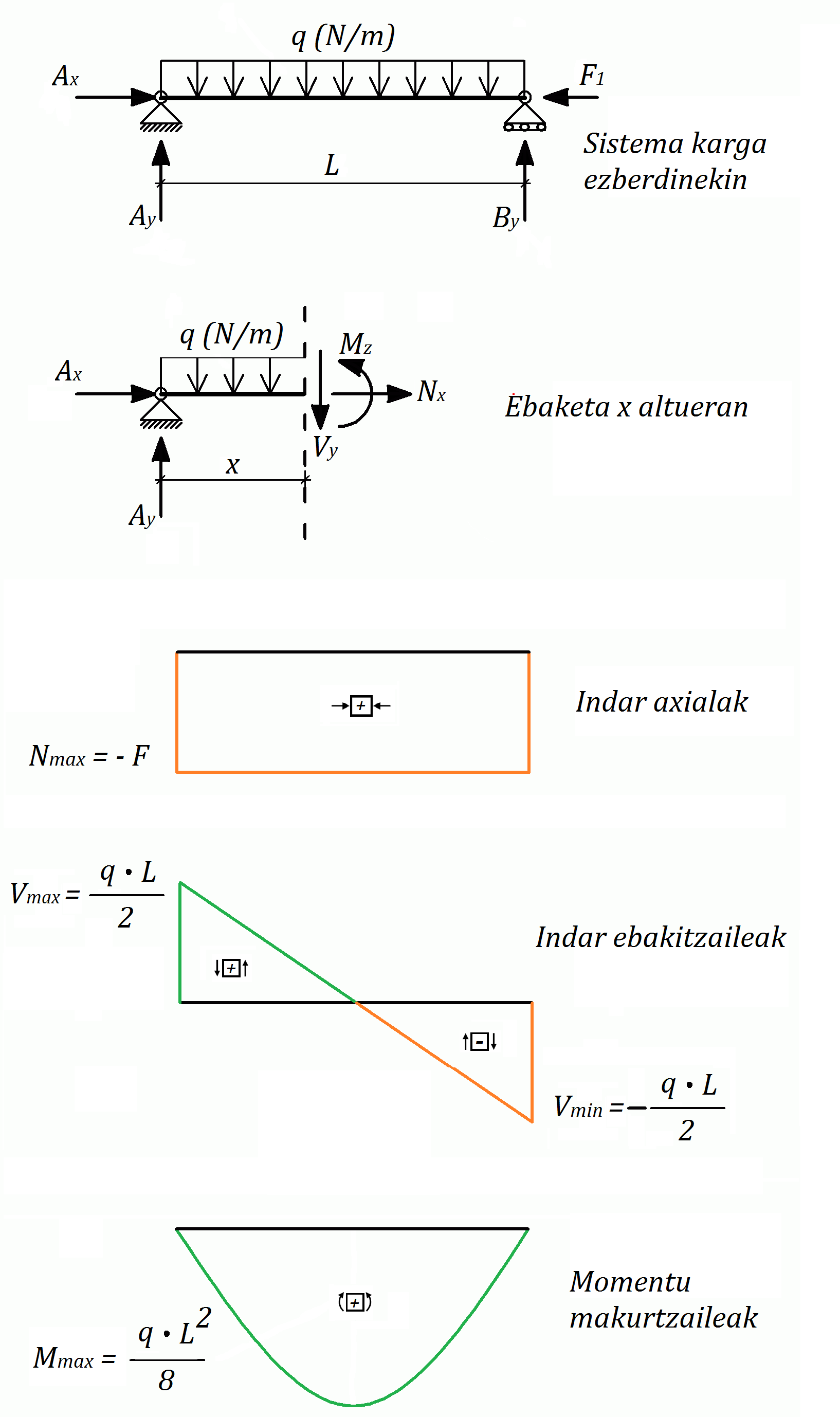 Esfortzu diagramak, File:Einfeldbalken.png fitxategian oinarrituta.